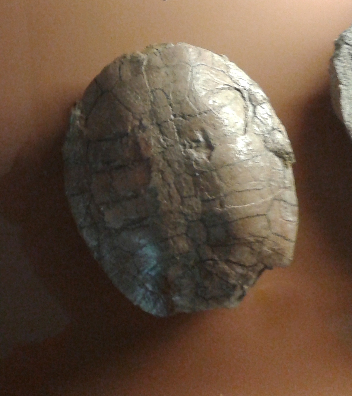 Português do Brasil: Cearachelys placidoi. Acervo do Museu Nacional/UFRJ. Rio de Janeiro, Brasil.